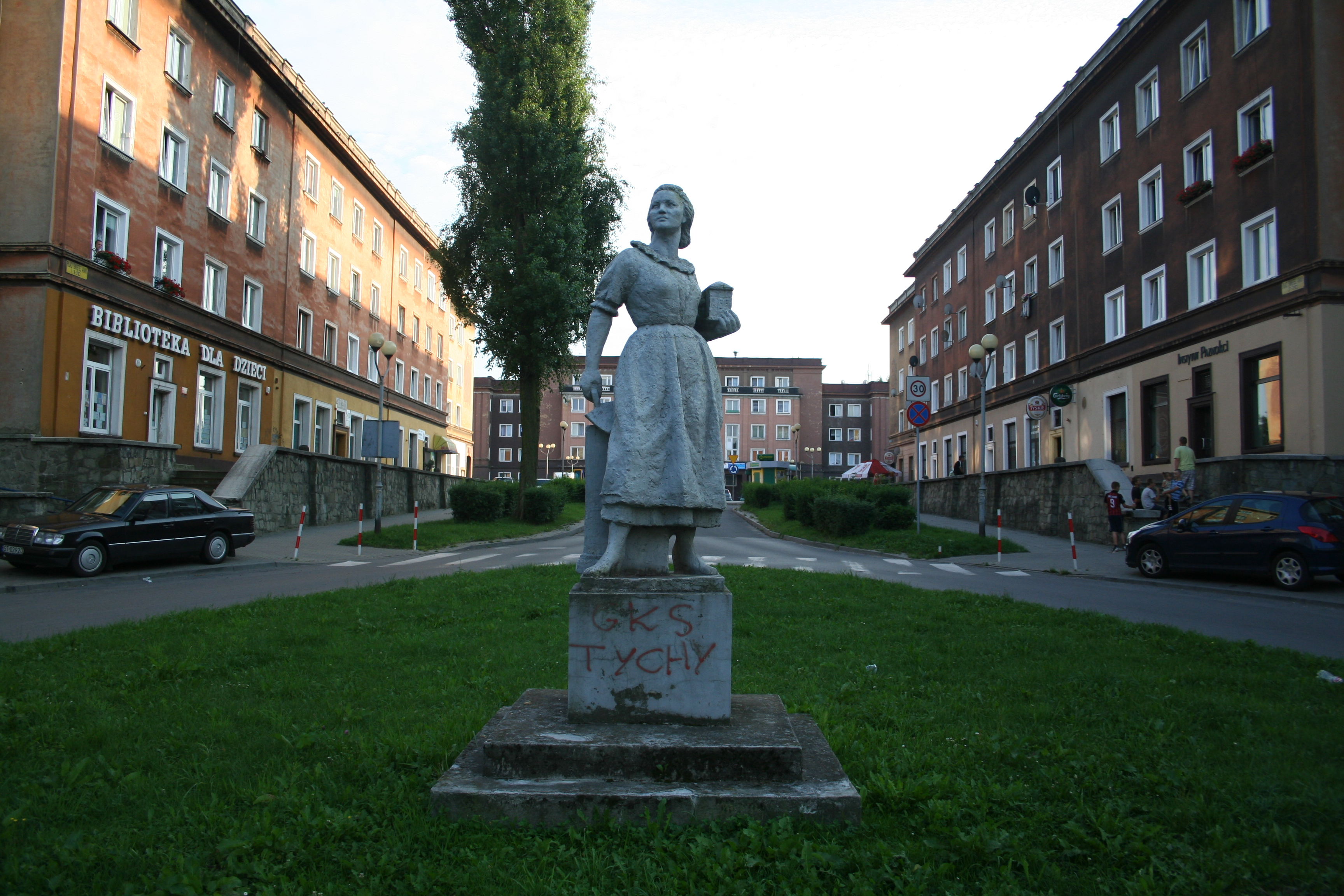 Robotnica z kielnią w Tychach na os. A, w tle plac św. Anny